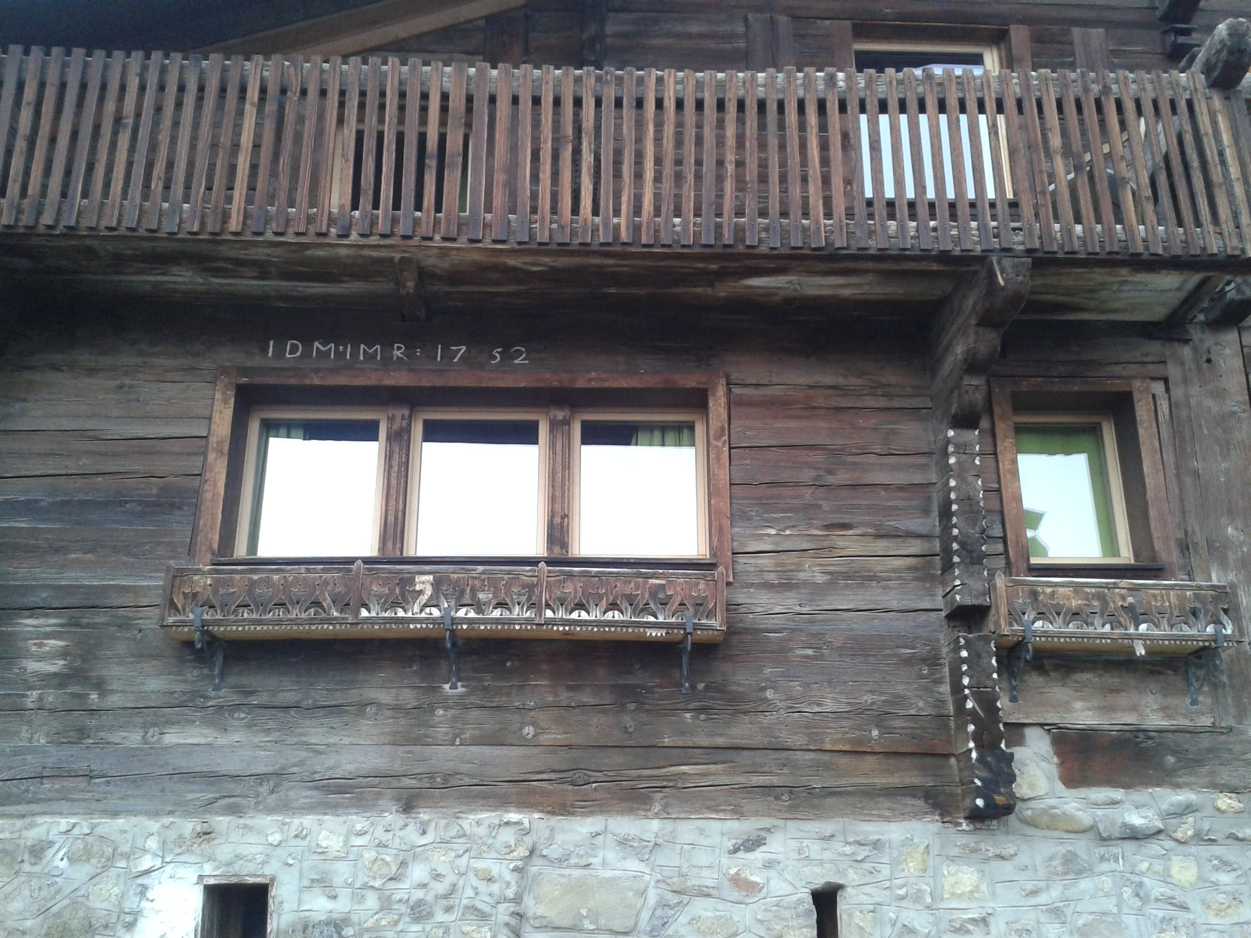 Détail d'une façade de chalet datant de 1752 de la ruelle du collège à Huémoz, commune d'Ollon, Vaud.